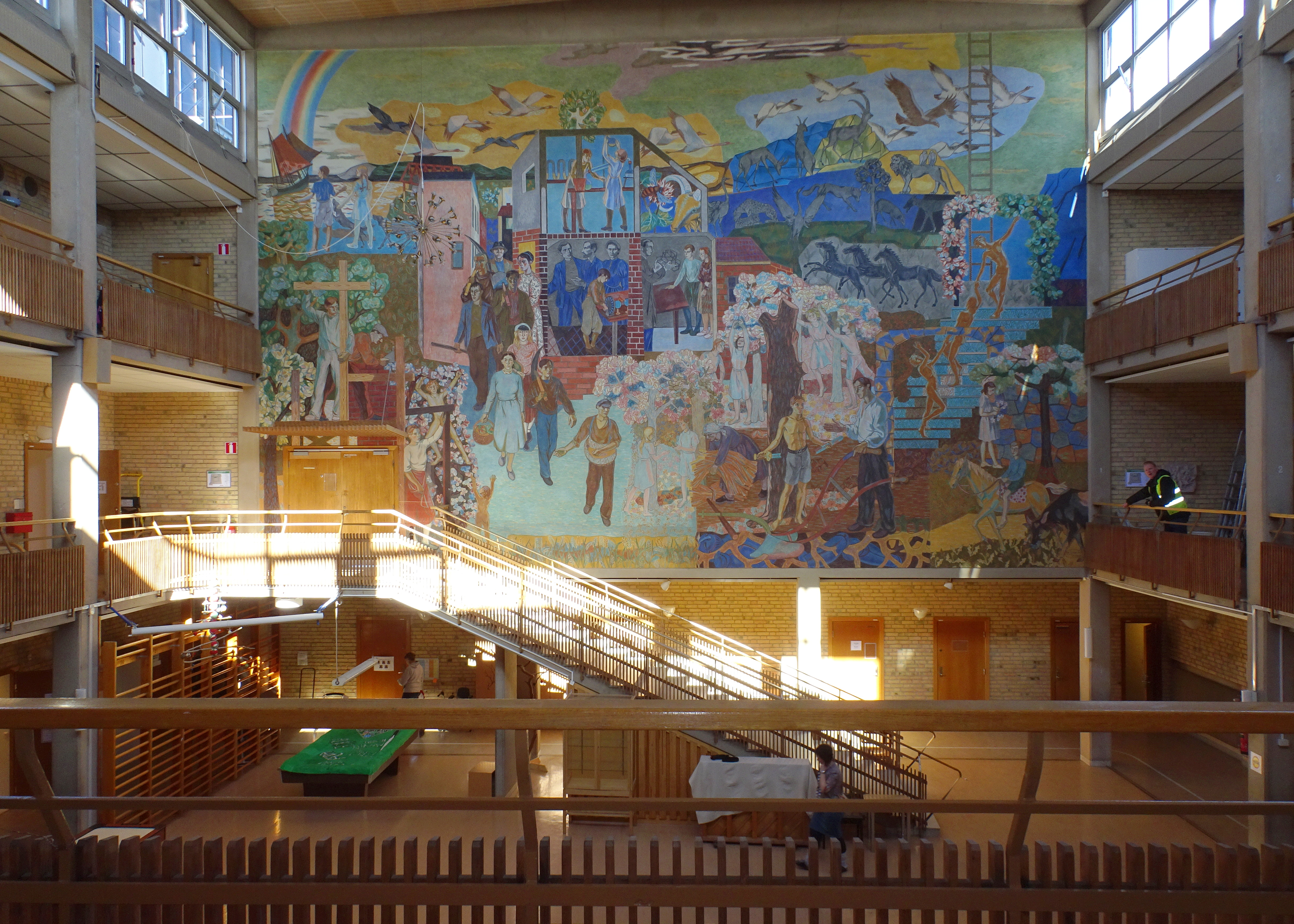 Skanskvarnsskolan centralhallen